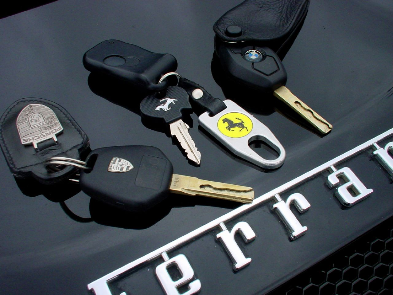 Car keys of Porsche, Ferrari and BMWPorsche vs. Ferrari vs. BMW